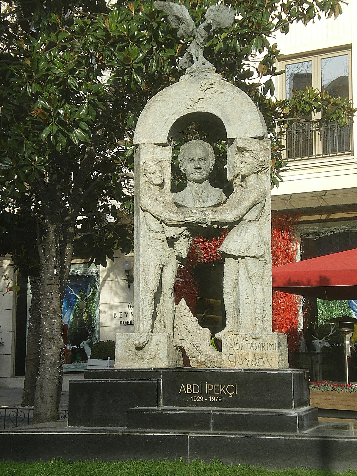 Abdi İpekçi Peace Monument, by Gürdal Duyar on Abdi İpekçi Street, İstanbul